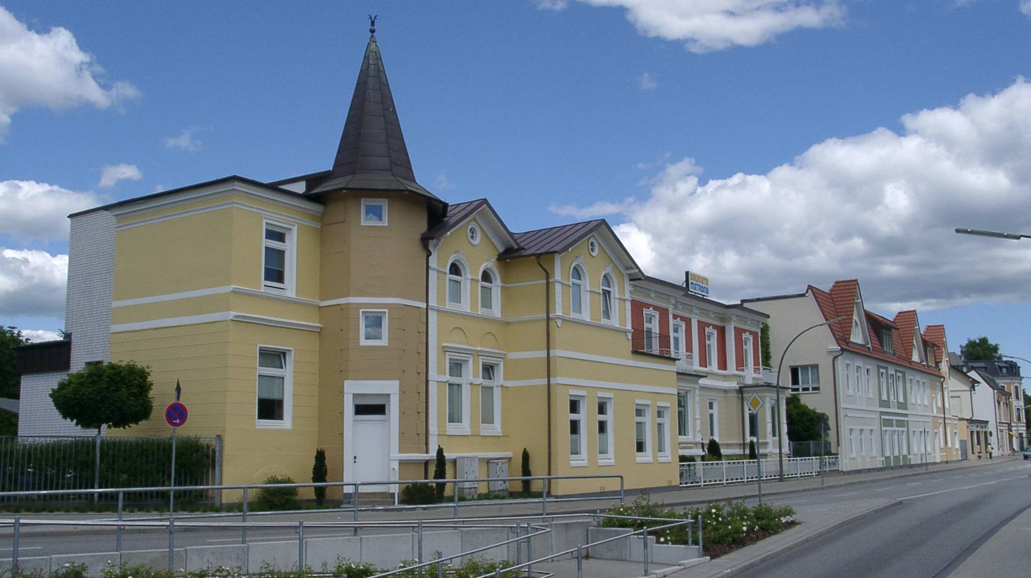 Hauptverwaltung Hamburg